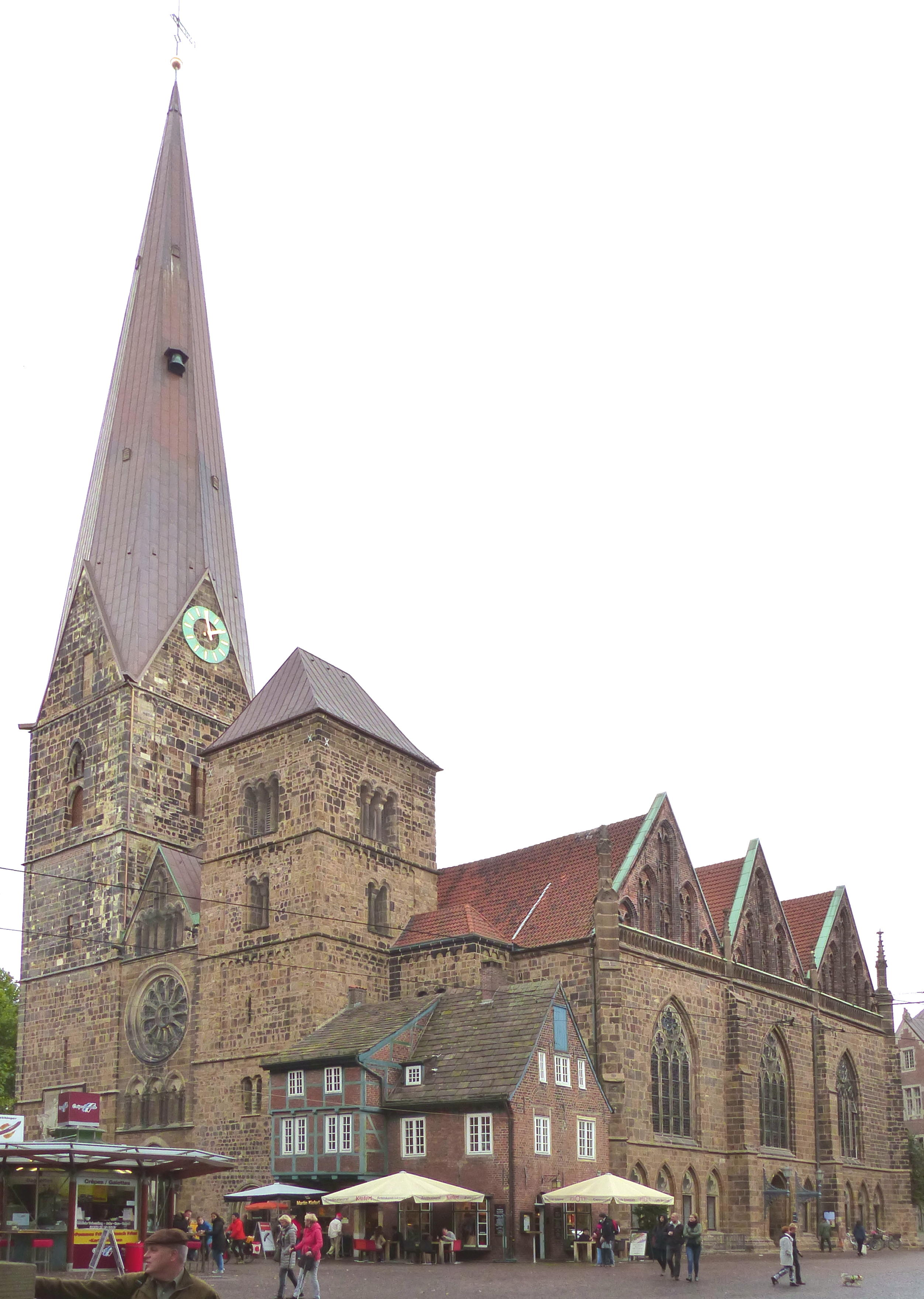 Liebfrauenkirche in Bremen von Westen, nach Neueindeckung des Nordturms